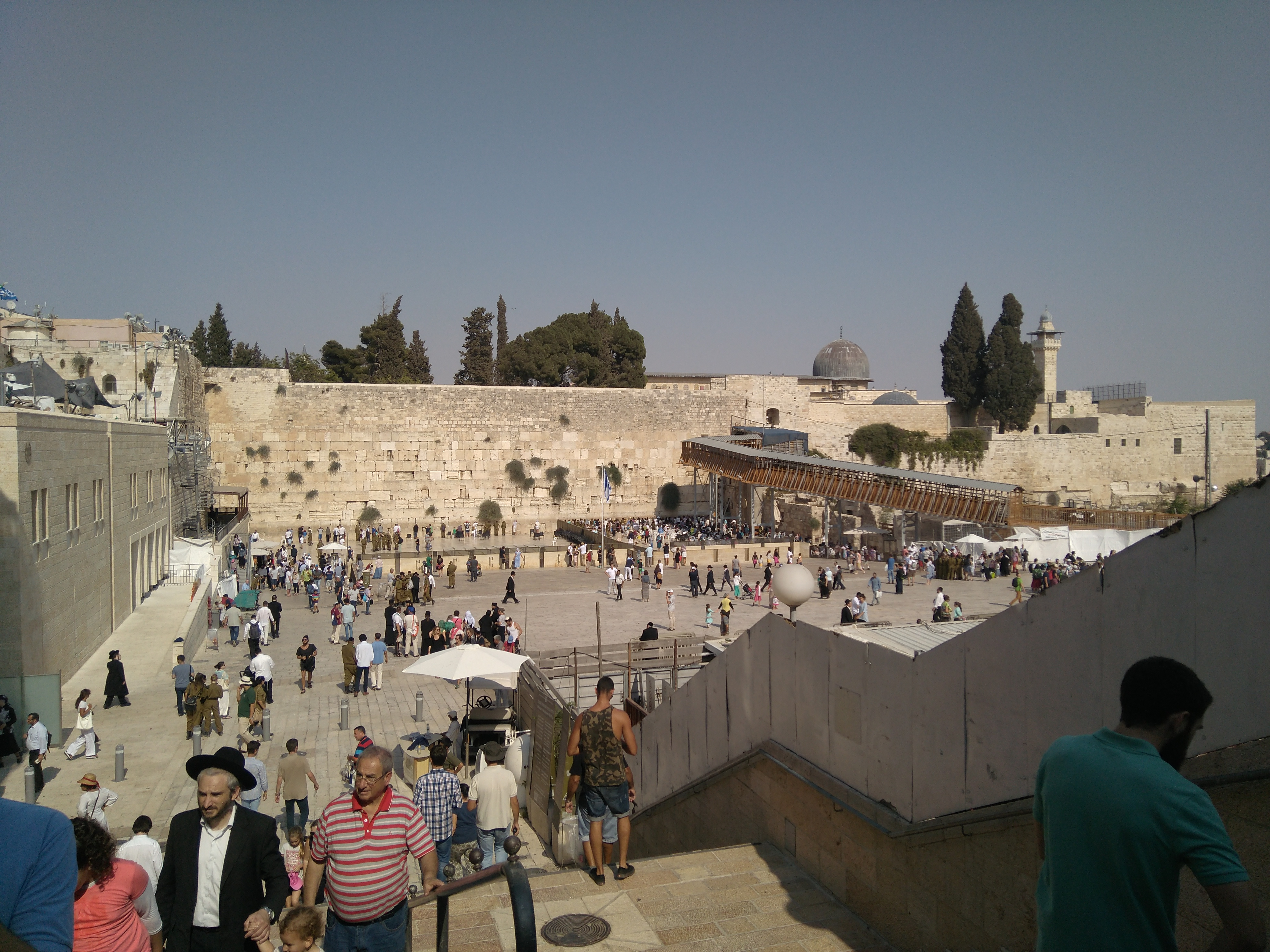 Explanada del Muro de las Lamentaciones en Jerusalén (Israel)